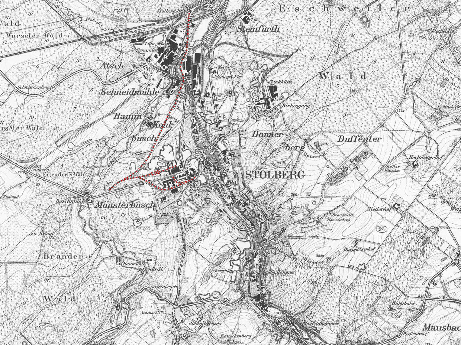 Königl.Preuß.Landesaufnahme 1893 - 1910, Stolberg Rhld., Bahnstrecke Stolberg - Münsterbusch